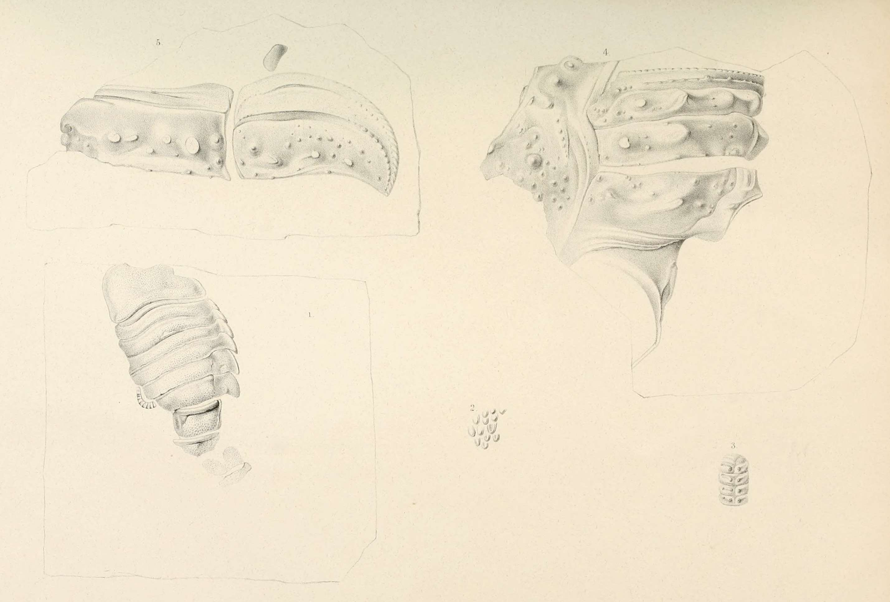 Palaeontographica. Beiträge zur Naturgeschichte der Vorwelt. Herausgegeben von Wilh. Dunker und Herm. von Meyer. Vierter Band. Cassel, Druck und Verlag von Theodor Fischer. 1851.